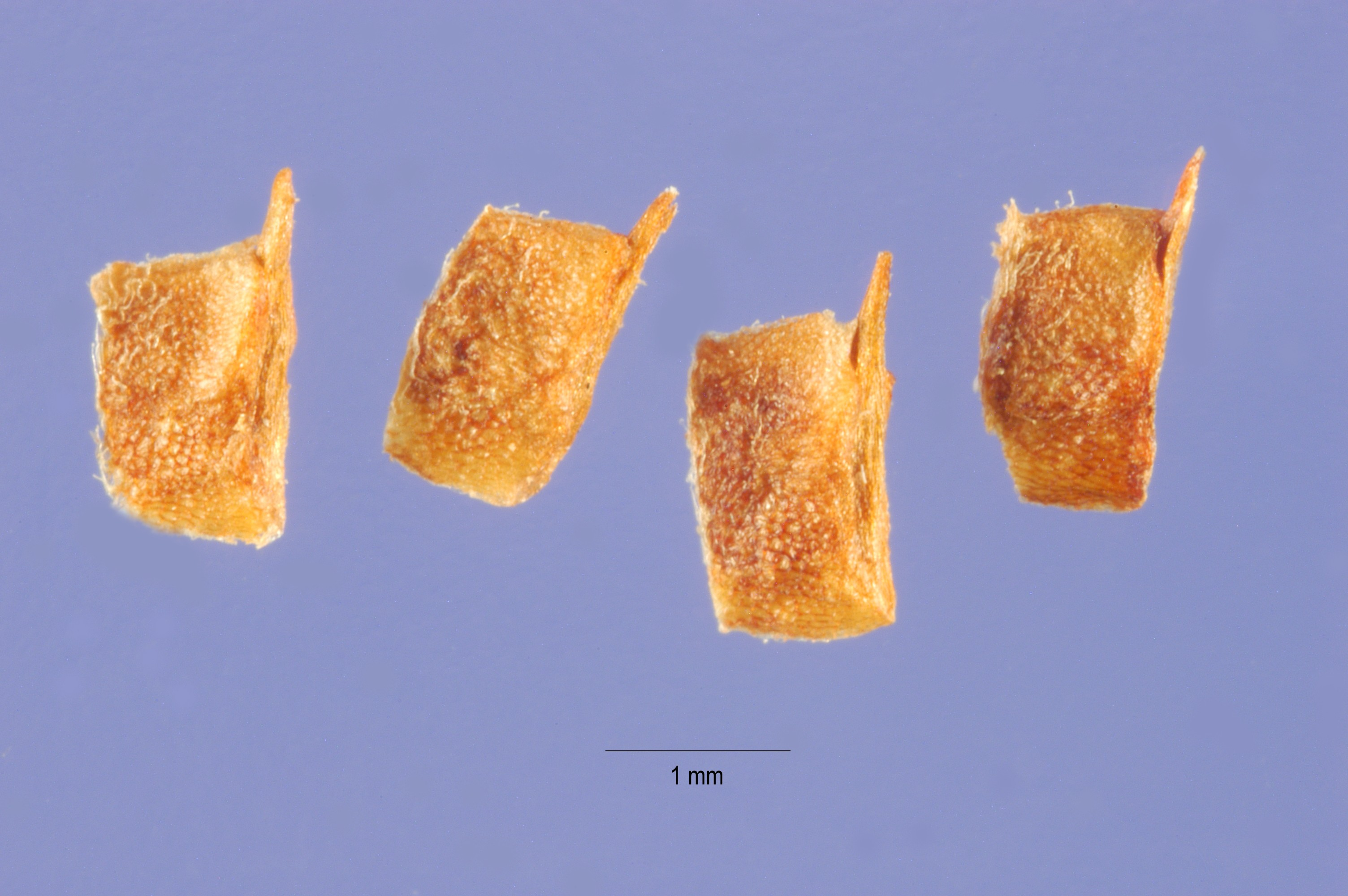 Myosurus minimus seeds